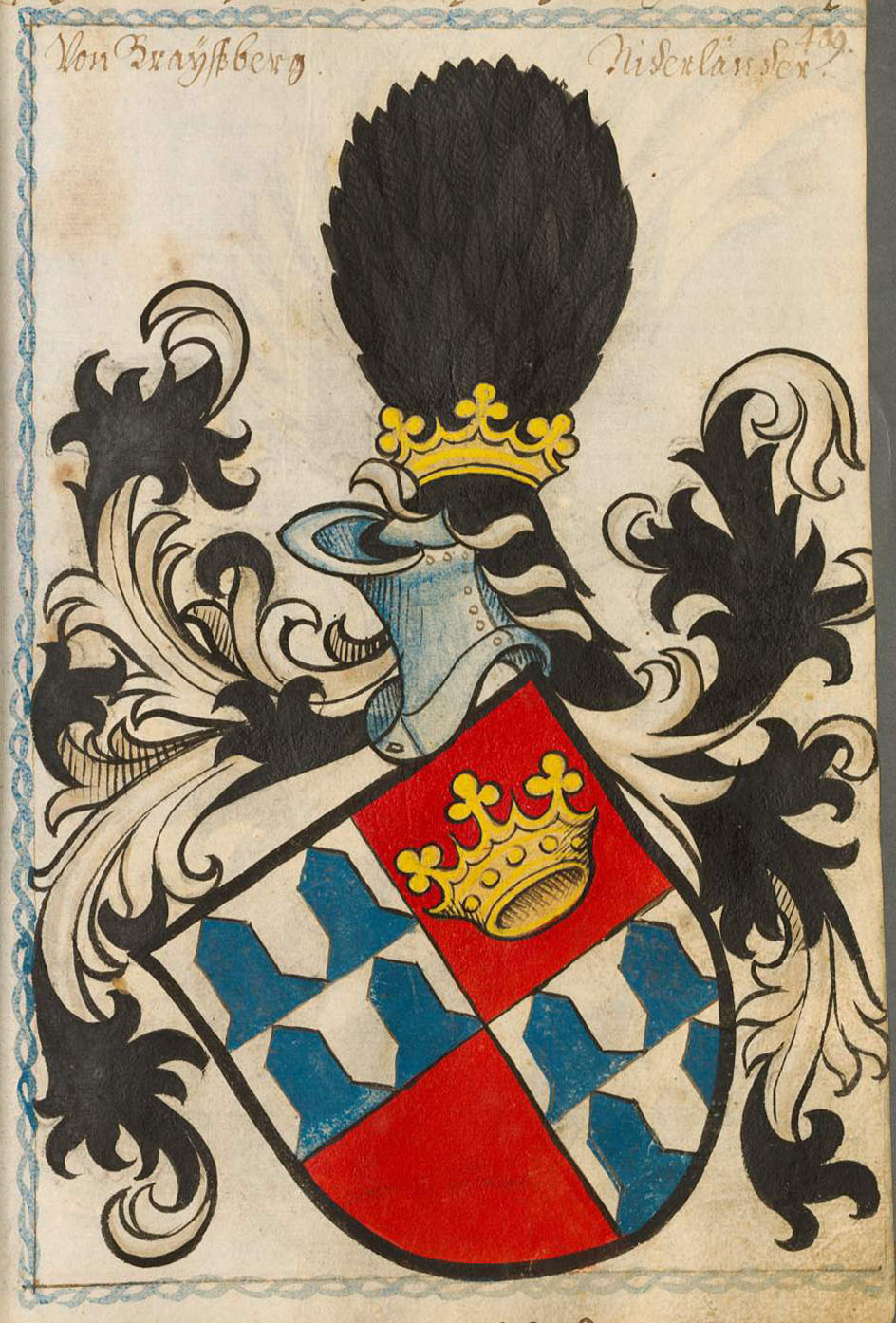 Scheibler'sches Wappenbuch , älterer Teil; Seite 409 Von Brayßberg Niederländer